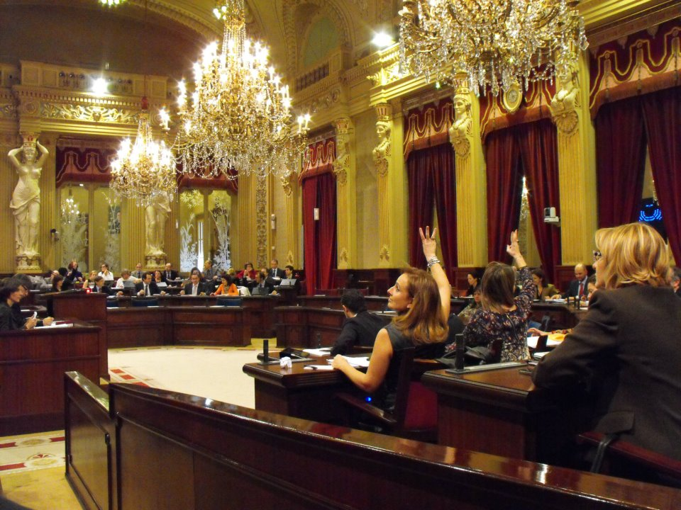 Sala de plens del Parlament de les Illes Balears durant una votació al debat dels pressupostos generals de la comunitat autònoma de 2012